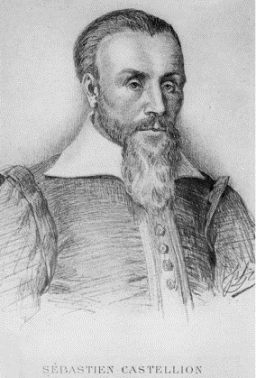 Sébastien Castellion